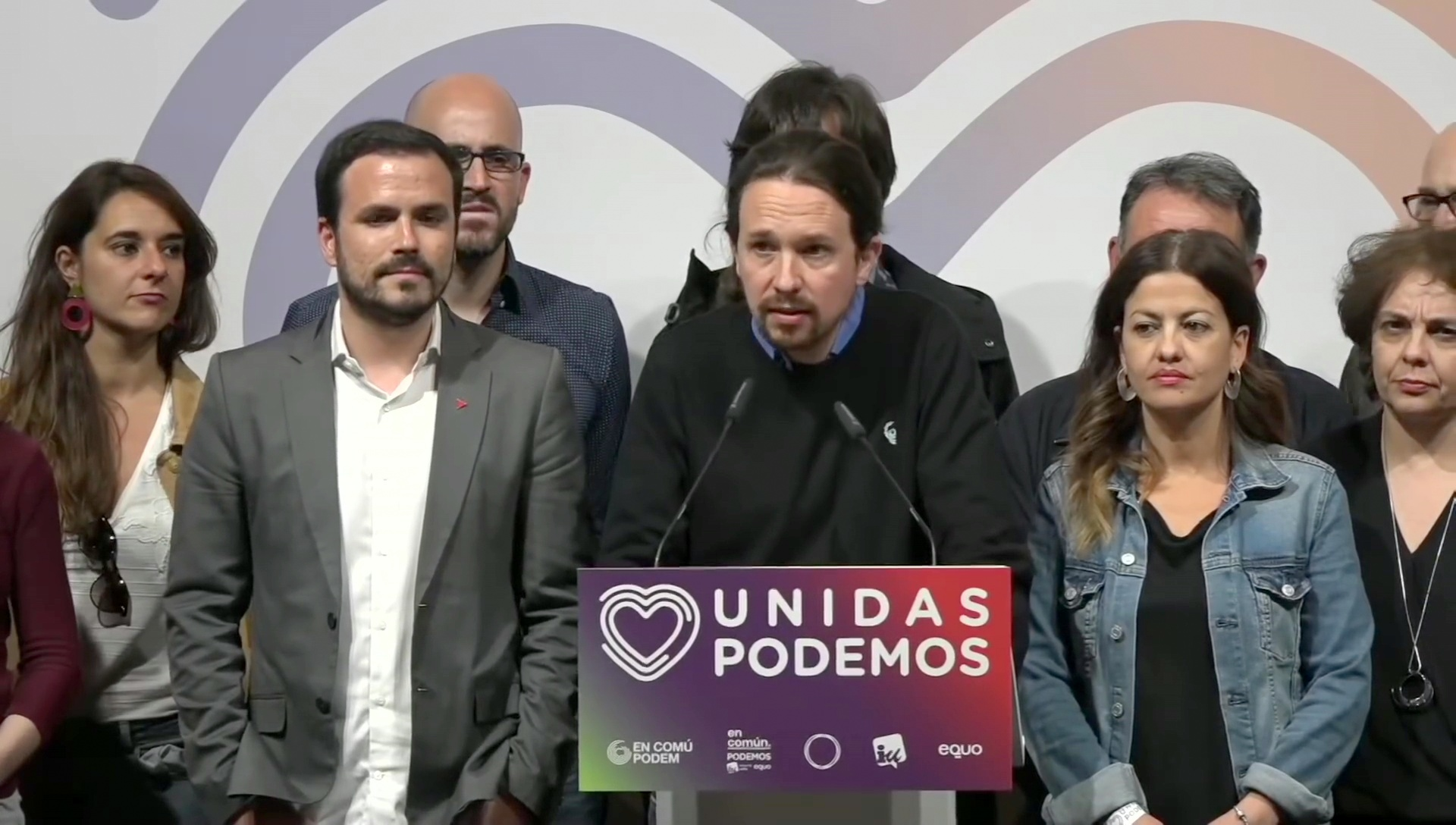 Valoración de los resultados de la jornada electoral de las elecciones generales de 2019 por parte de Unidas Podemos